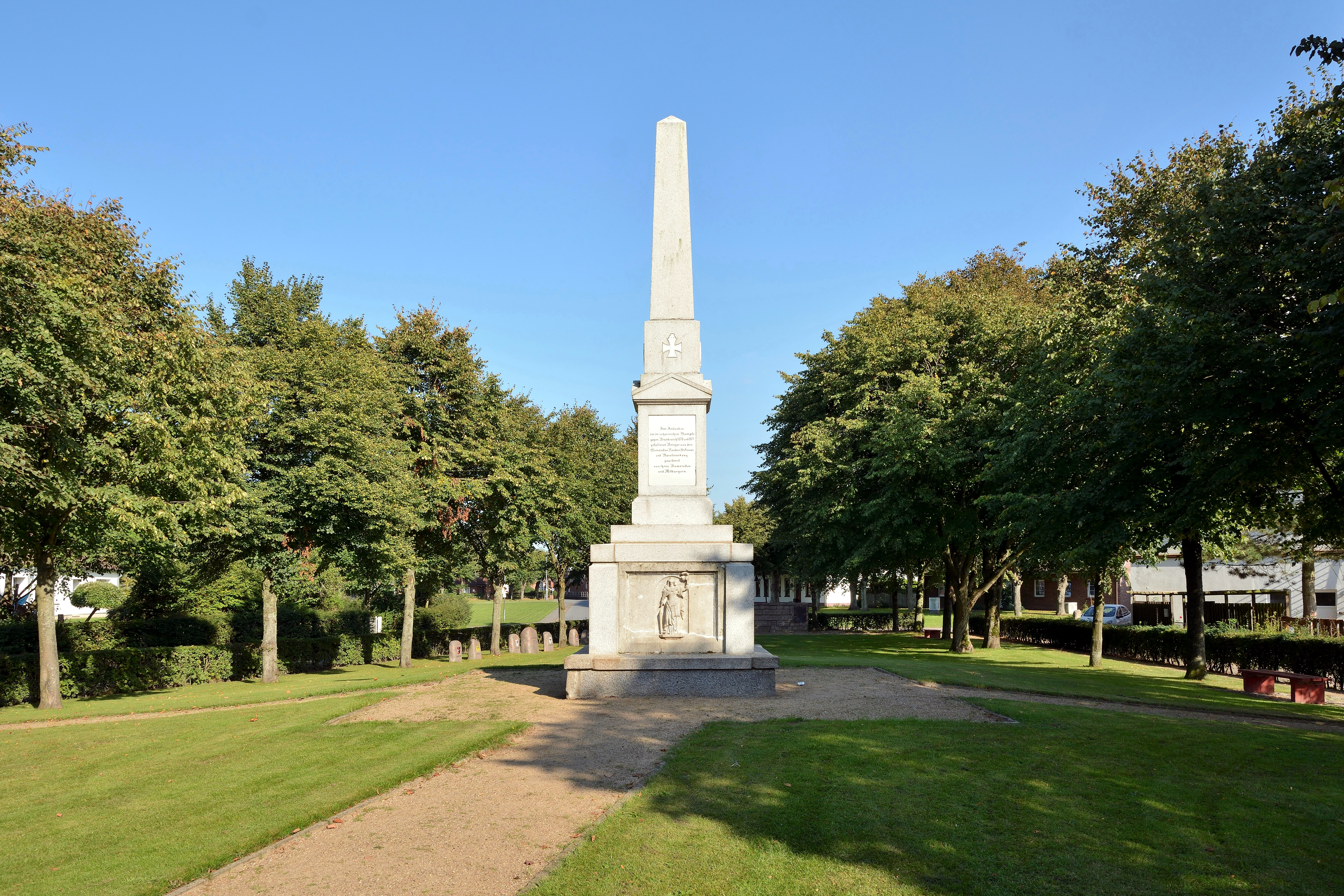 Der Denkmalsplatz am Gänsemarkt in Lunden hat Gedenkstätten für die Toten der Weltkriege, den Krieg gegen Frankreich 1870/71 und der Vertreibung nach dem Zweiten Weltkrieg.